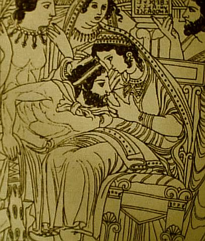 La déesse étrusque Uni allaitant Hercle. Dessin du motif d'un miroir étrusque de Volterra. Conservé au Musée national archéologique de Florence, inv. 72740.